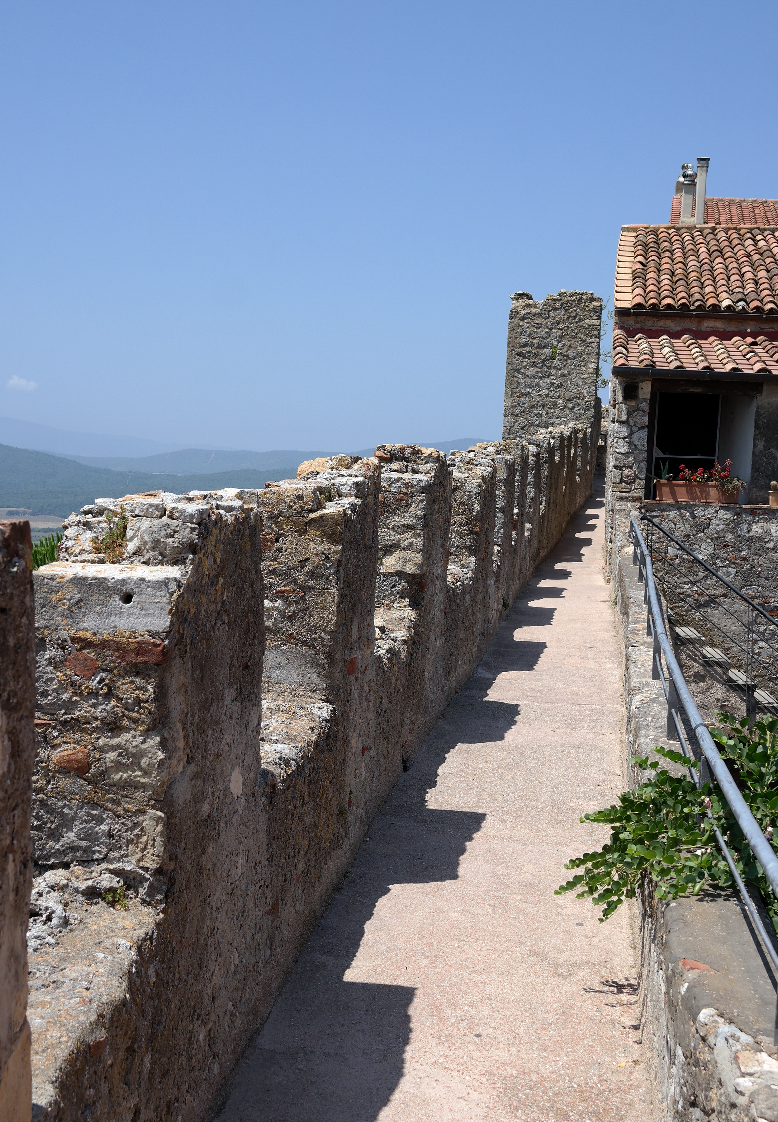 Camminamento sulle mura di Capalbio